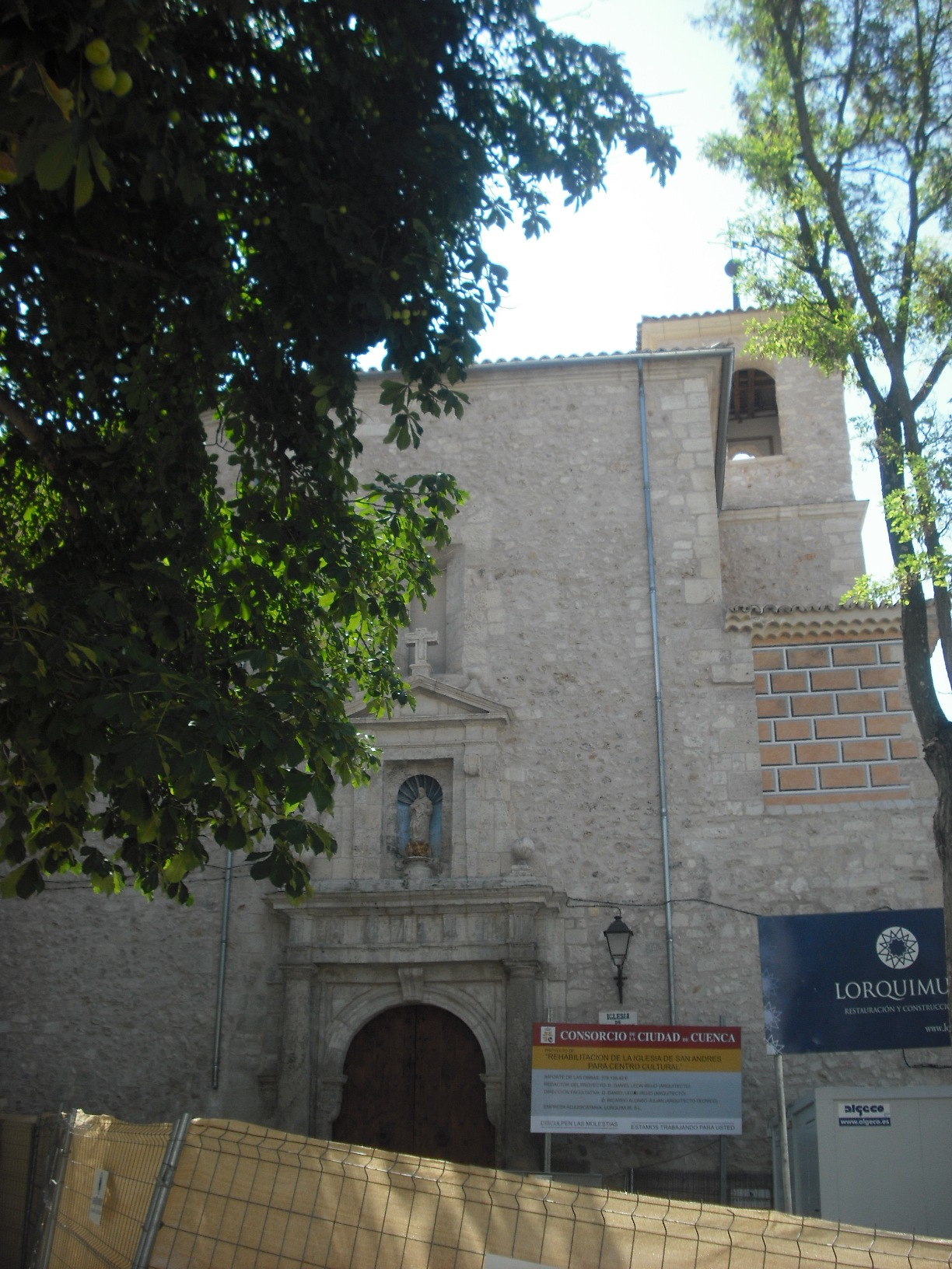 Iglesia de San Andrés.